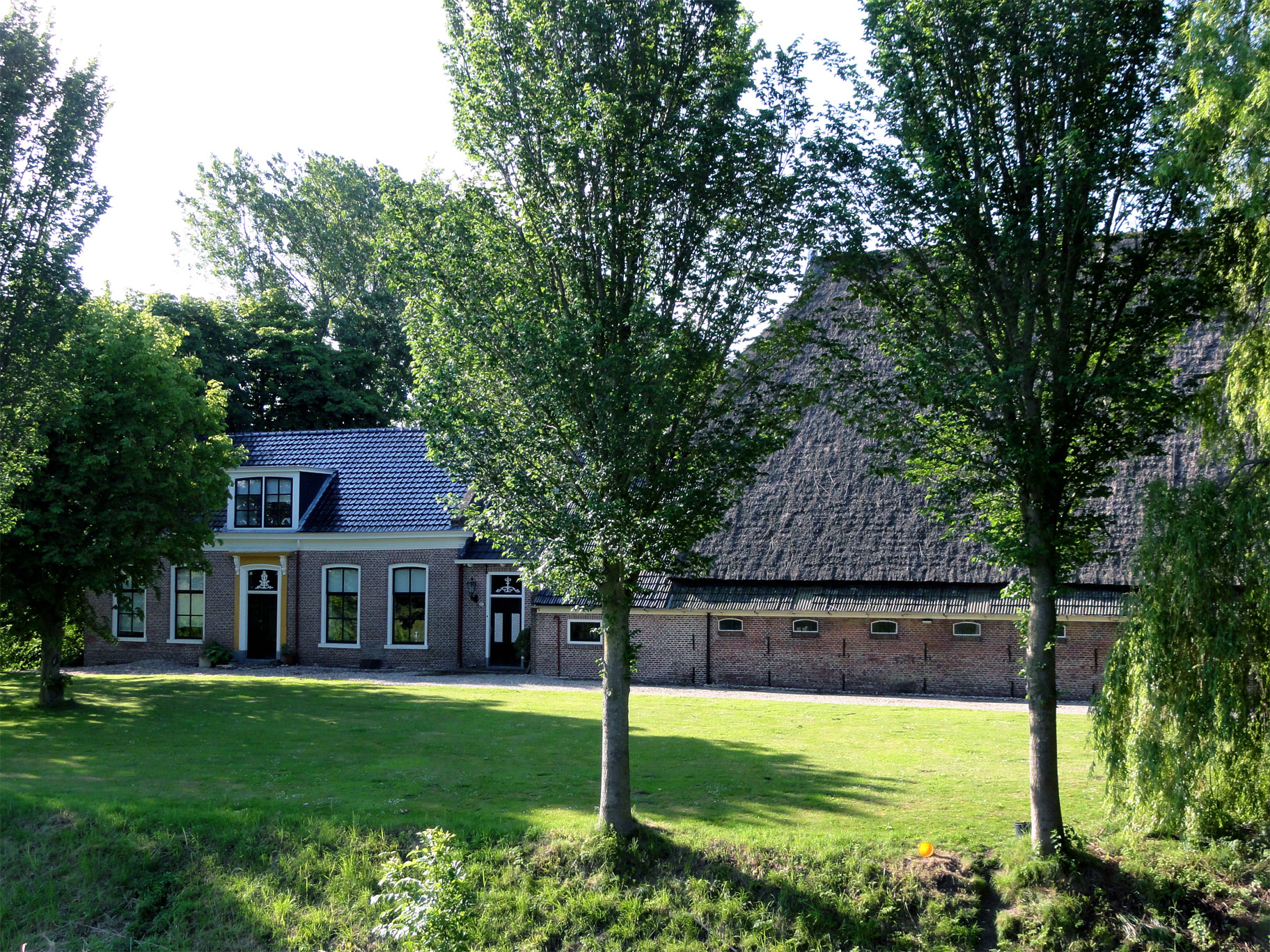 Oudebildtdijk 835 in Sint-Jacobiparochie